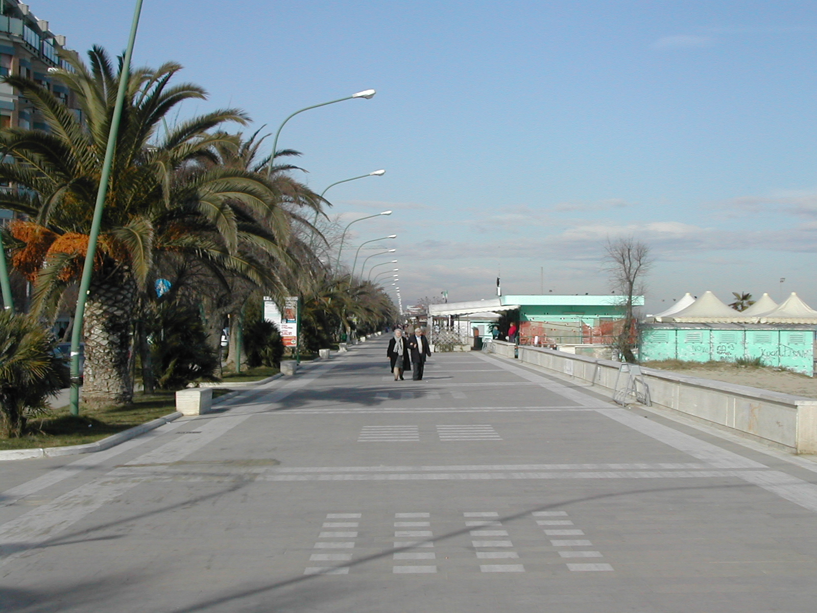 Pescara Lungomare Nord